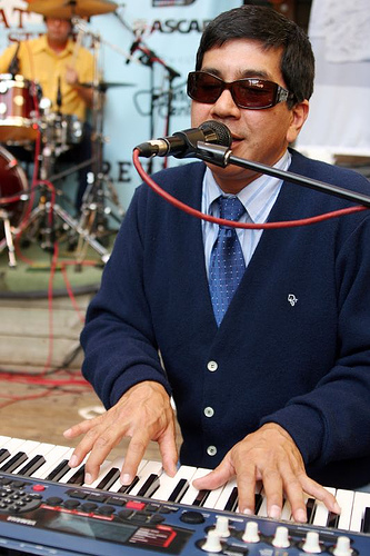 Note: Sebbene in Flickr la licenza indicata non sia GFDL, lo è su Wikipedia in base al ticket.